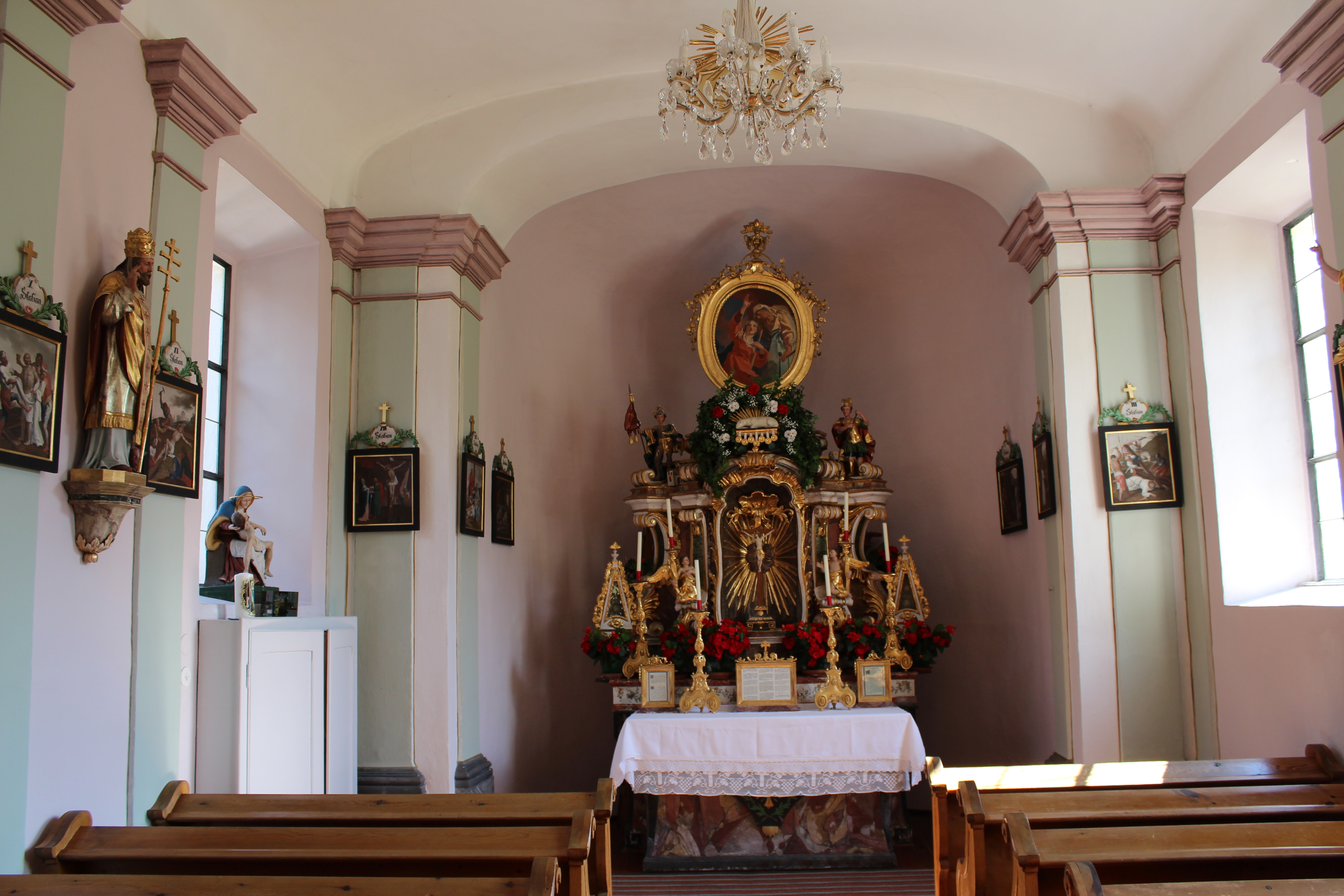 Kapelle Maria Heimsuchung